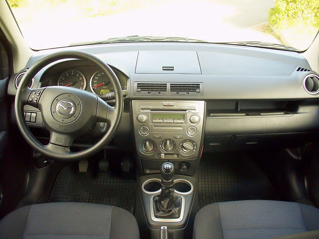 Mazda2 Facelift